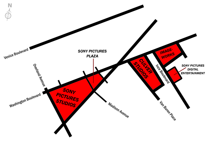 Gemaakt met Adobe Photoshop CS. Plattegrond van Sony Pictures Studios en dichtbij liggende Culver Studios. De plattegrond is van downtown Century City, bij Los Angeles in Californië, Verenigde Staten. Het omvat: (lees: op de plattegrond staat aangegeven:) Sony Pictures Studios, Sony Pictures Plaza, Culver Studios, Sony Pictures Imageworks (Imageworks) en Sony Pictures Digital Entertainment.